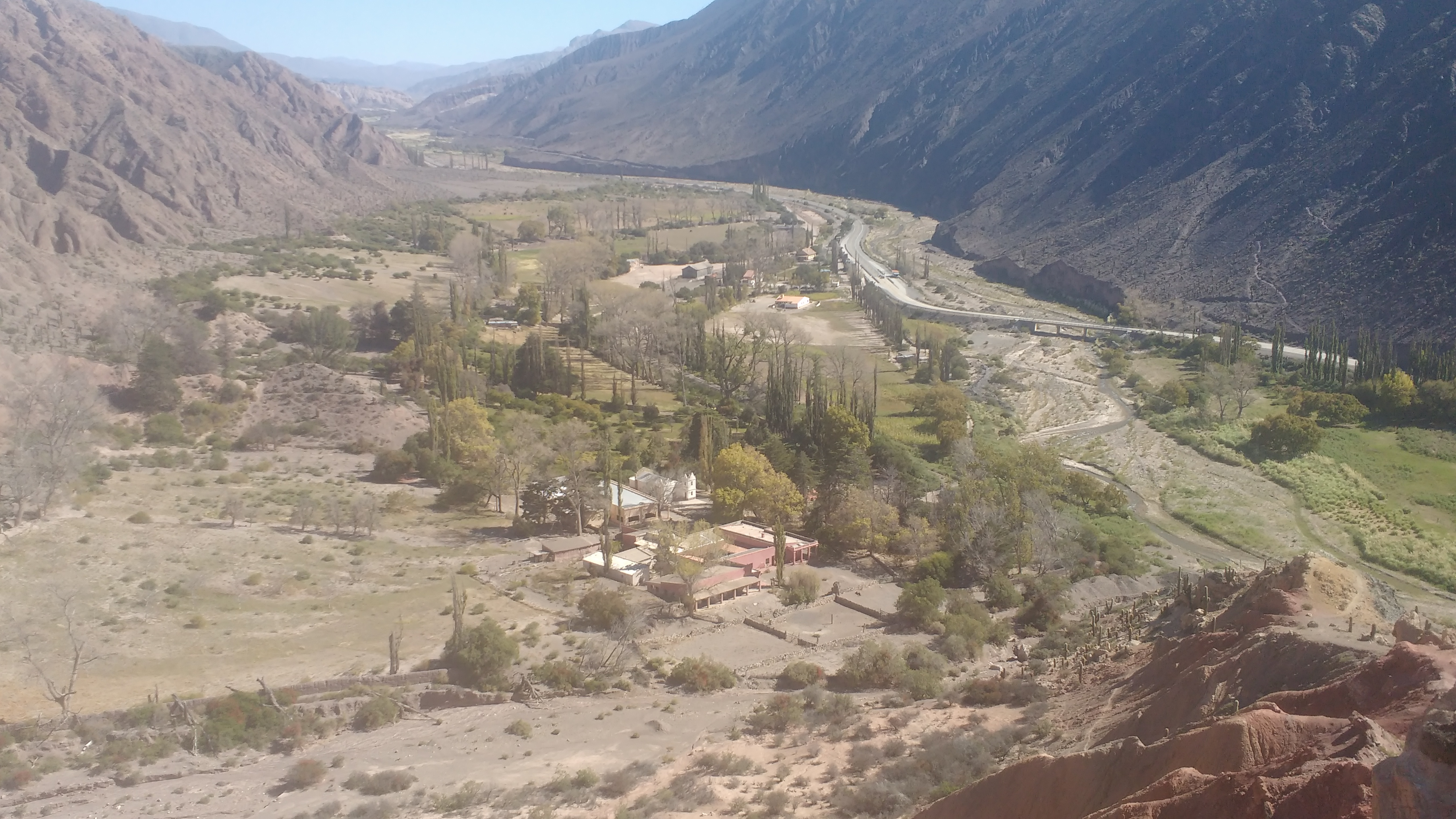 Natural. lugares